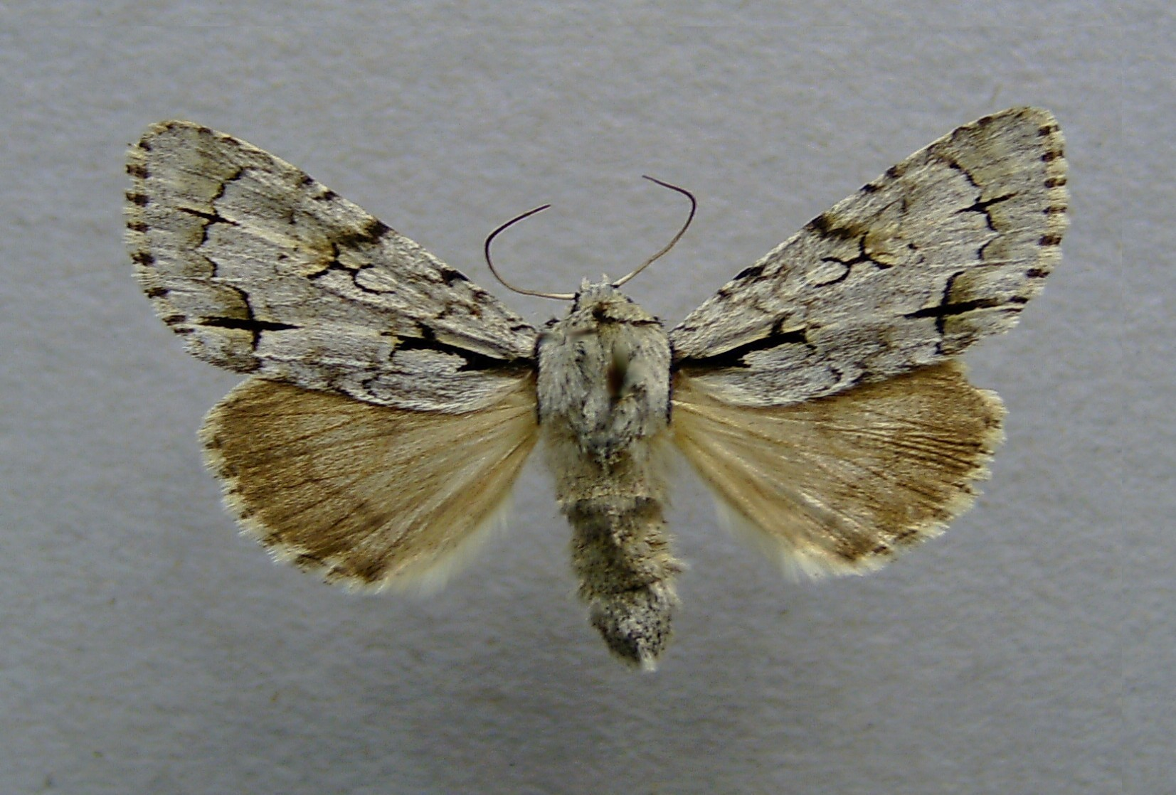 Acronicta cuspis